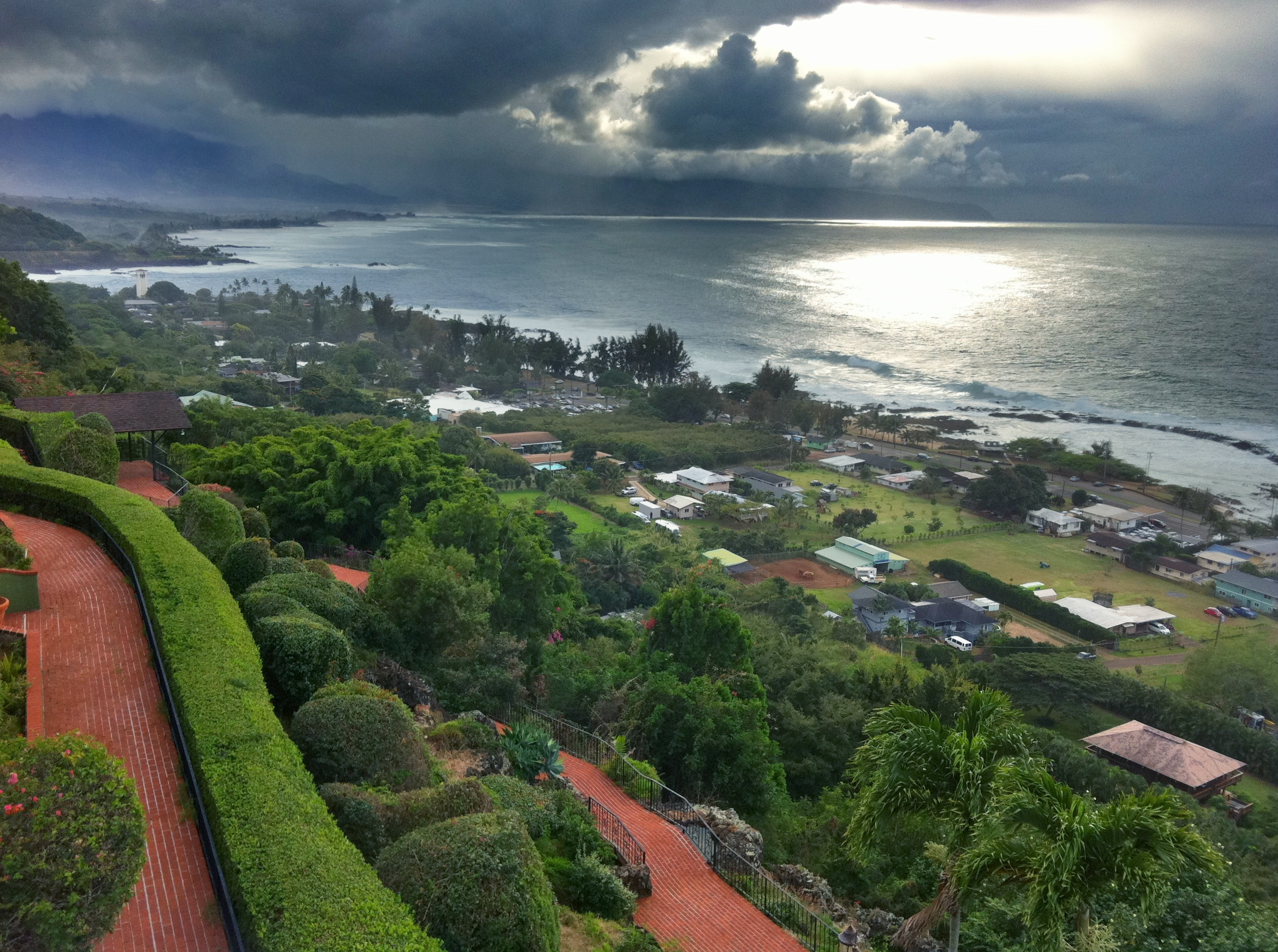 Pūpūkea, Oahu, Hawaii